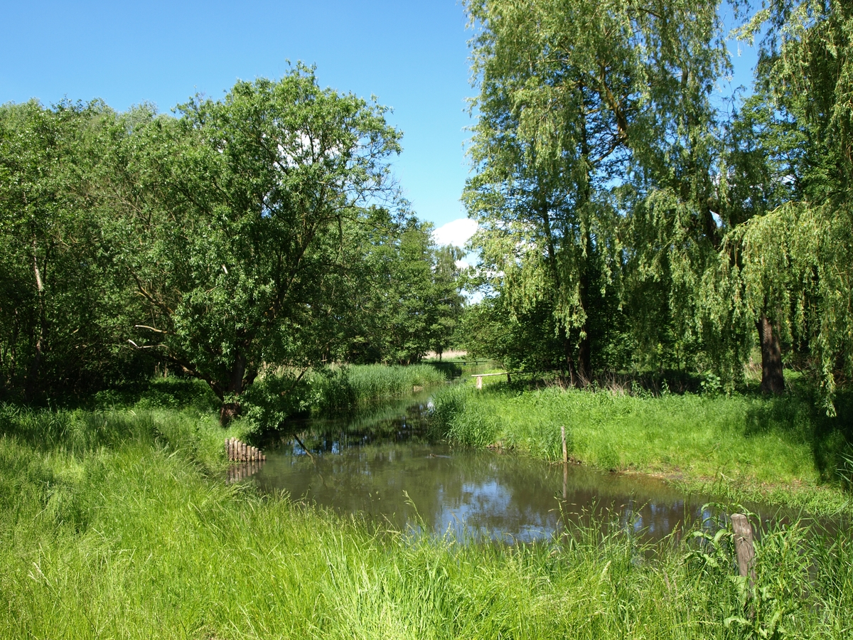 Die_Boize